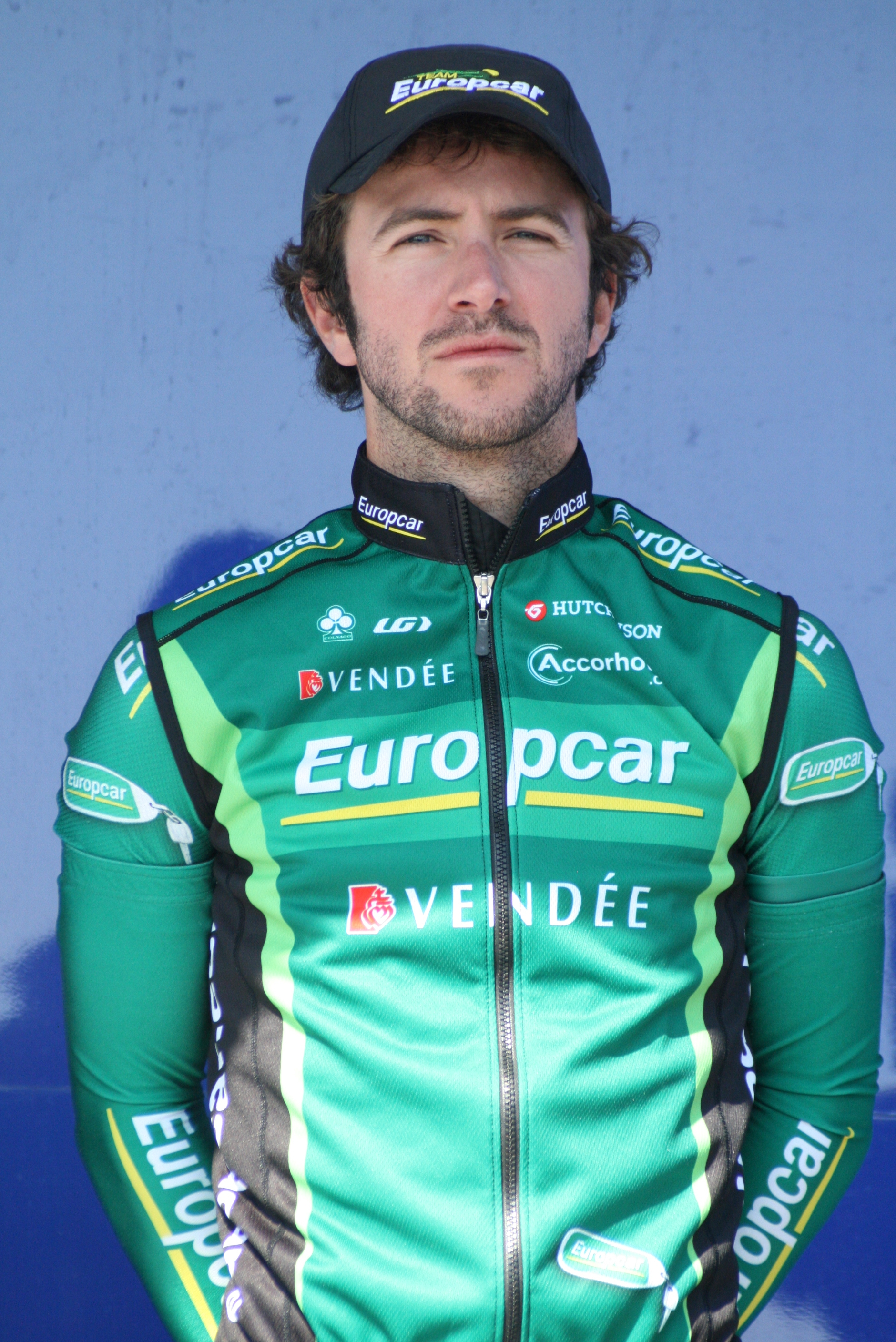 Présentation des coureurs au départ de la première étape Giovanni Bernaudeau